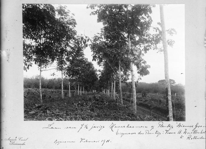 Negatief. Laan met Hevea rubberbomen op plantage Nieuwe Grond